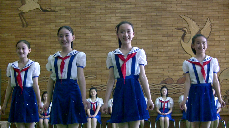 Mangyondae Schoolchildrens Palace in Pyongyang